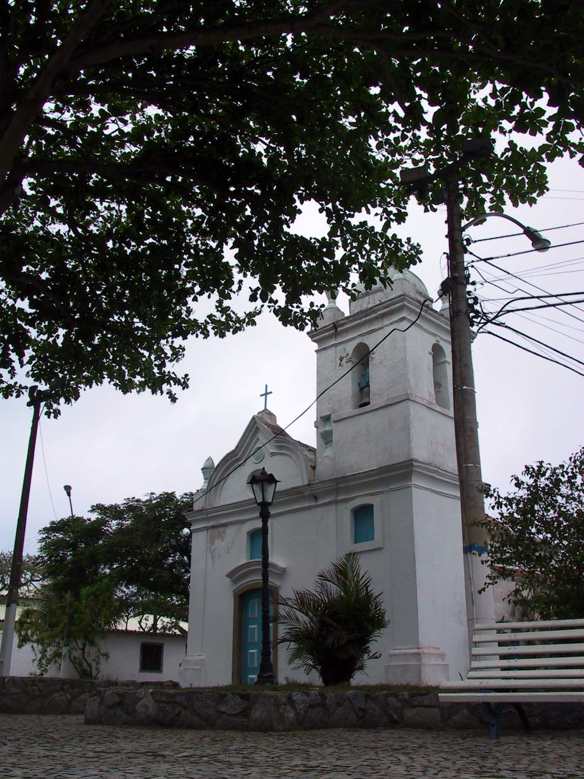 Igreja de São Benedito, Cabo Frio, RJ, Brasil